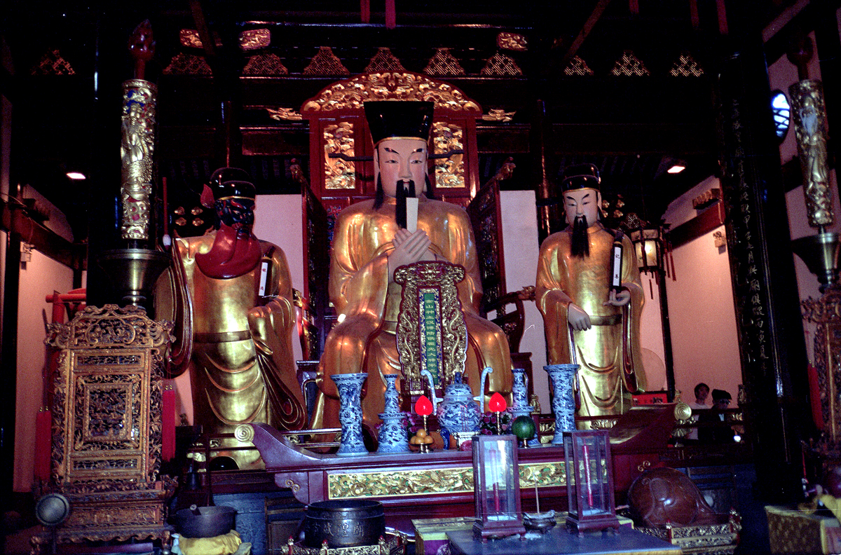 上海城隍庙供奉汉光禄侯霍光大将军之灵位